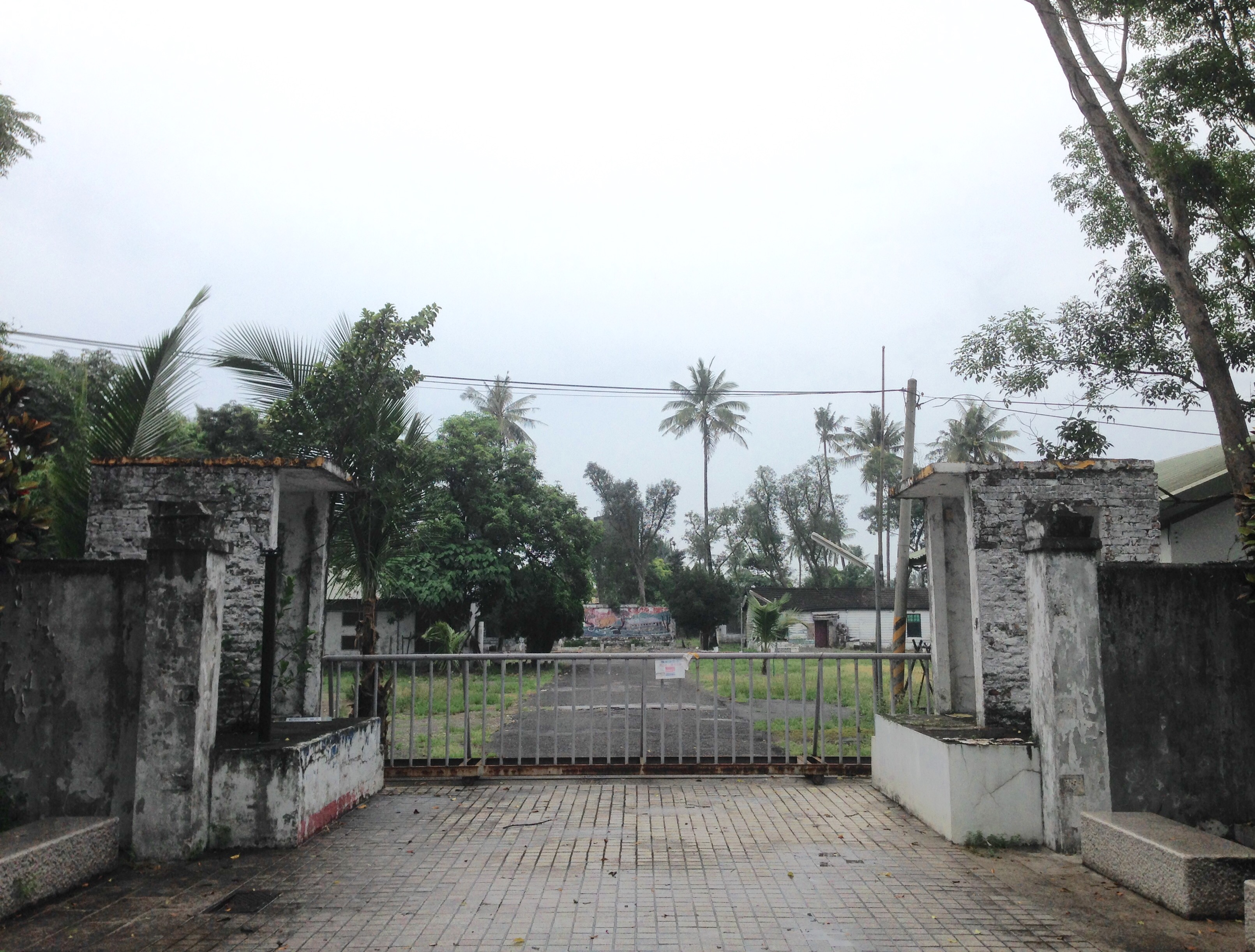 麟洛隘寮營區大門